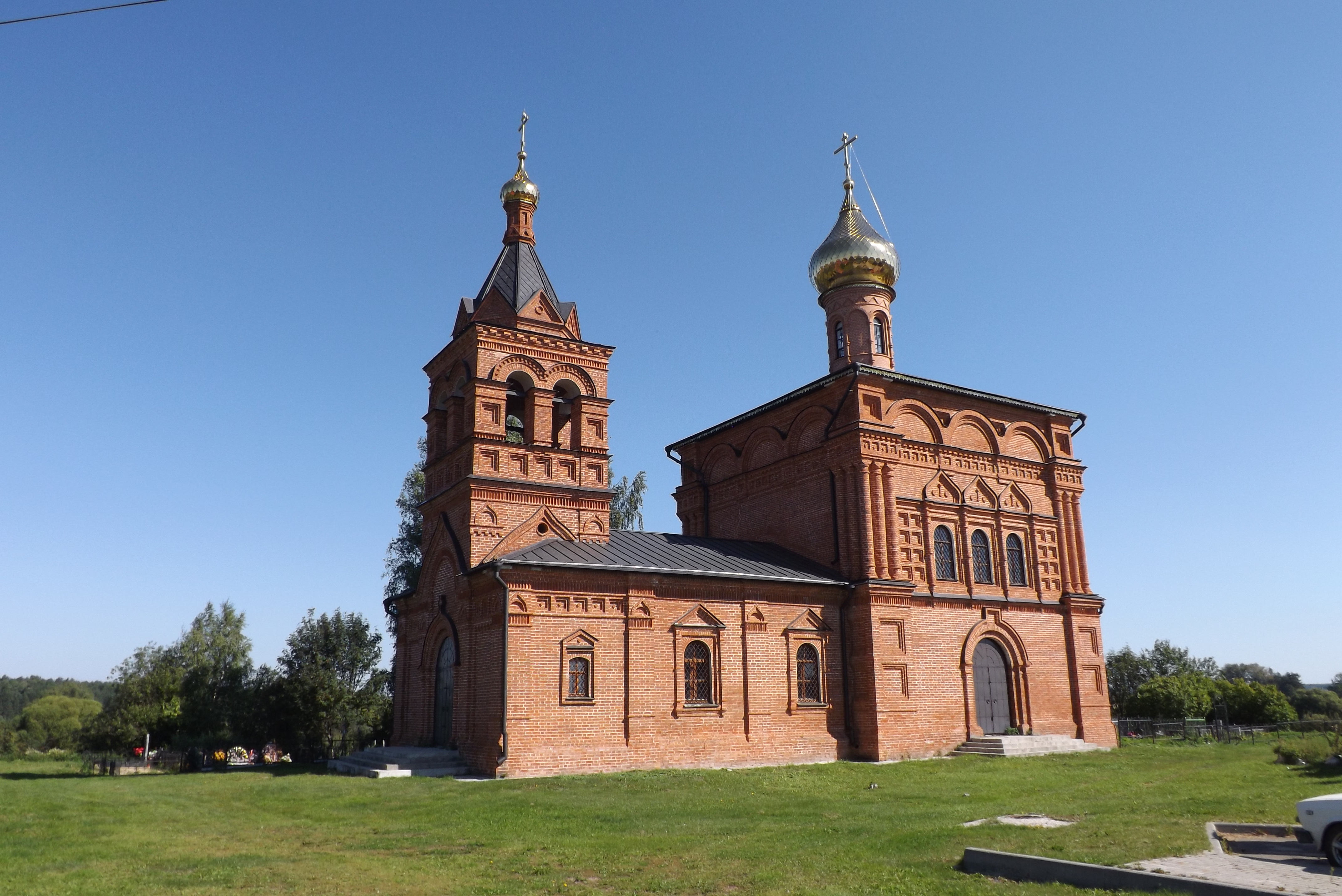 Церковь Феодора Тирона: Заполицы, Суздальский район, Владимирская область